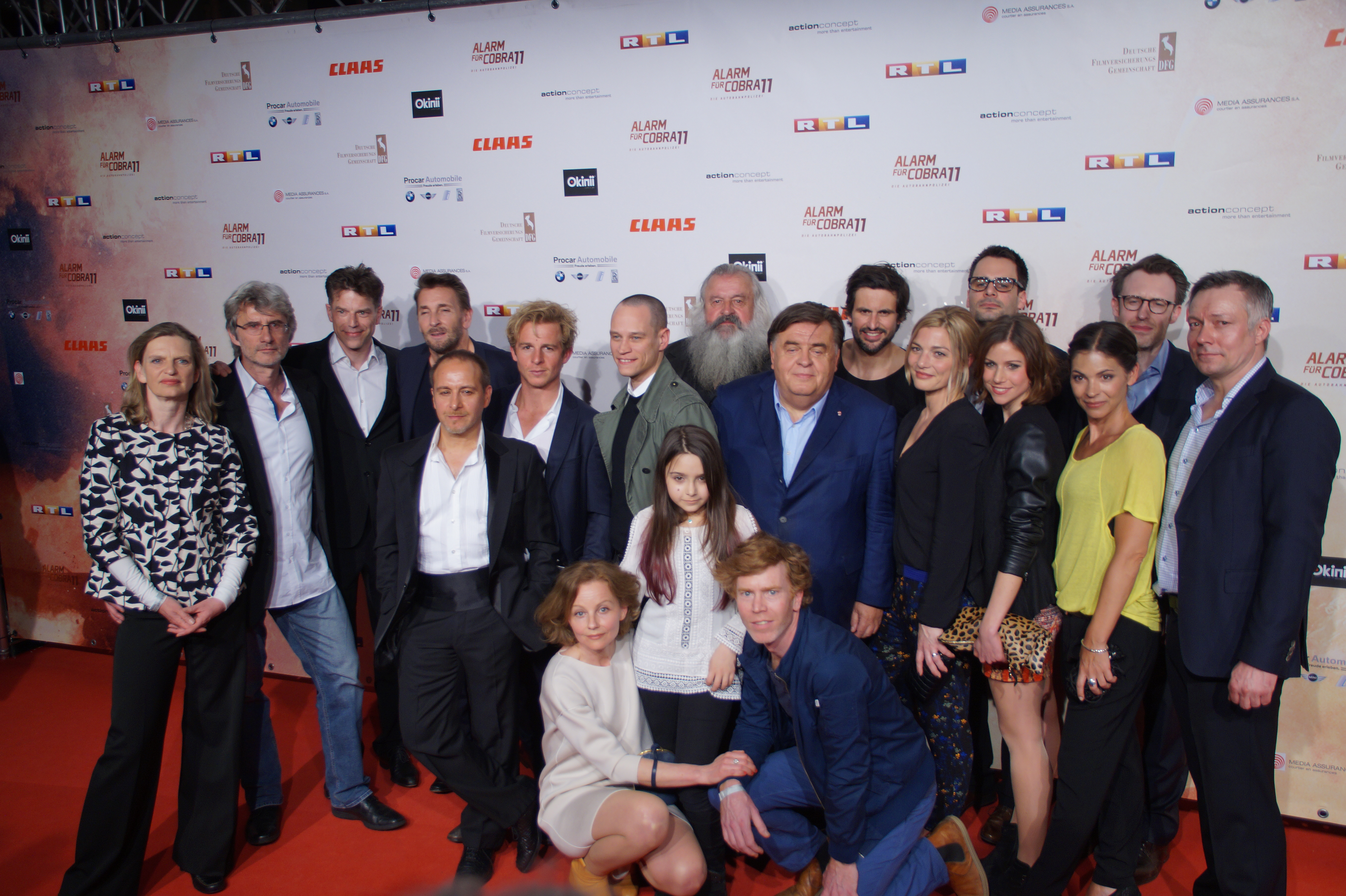 bei der Premiere von der 300. Folge 'Alarm für Cobra 11', April 2016.